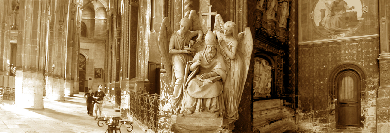 panorama de l'église Saint-Eustache a Paris